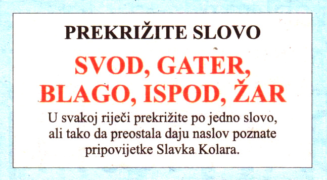 Prekrižite slovo autora Jovana Nedića iz Nedjeljnog Glasa Slavonije od 13. XII. 2009.